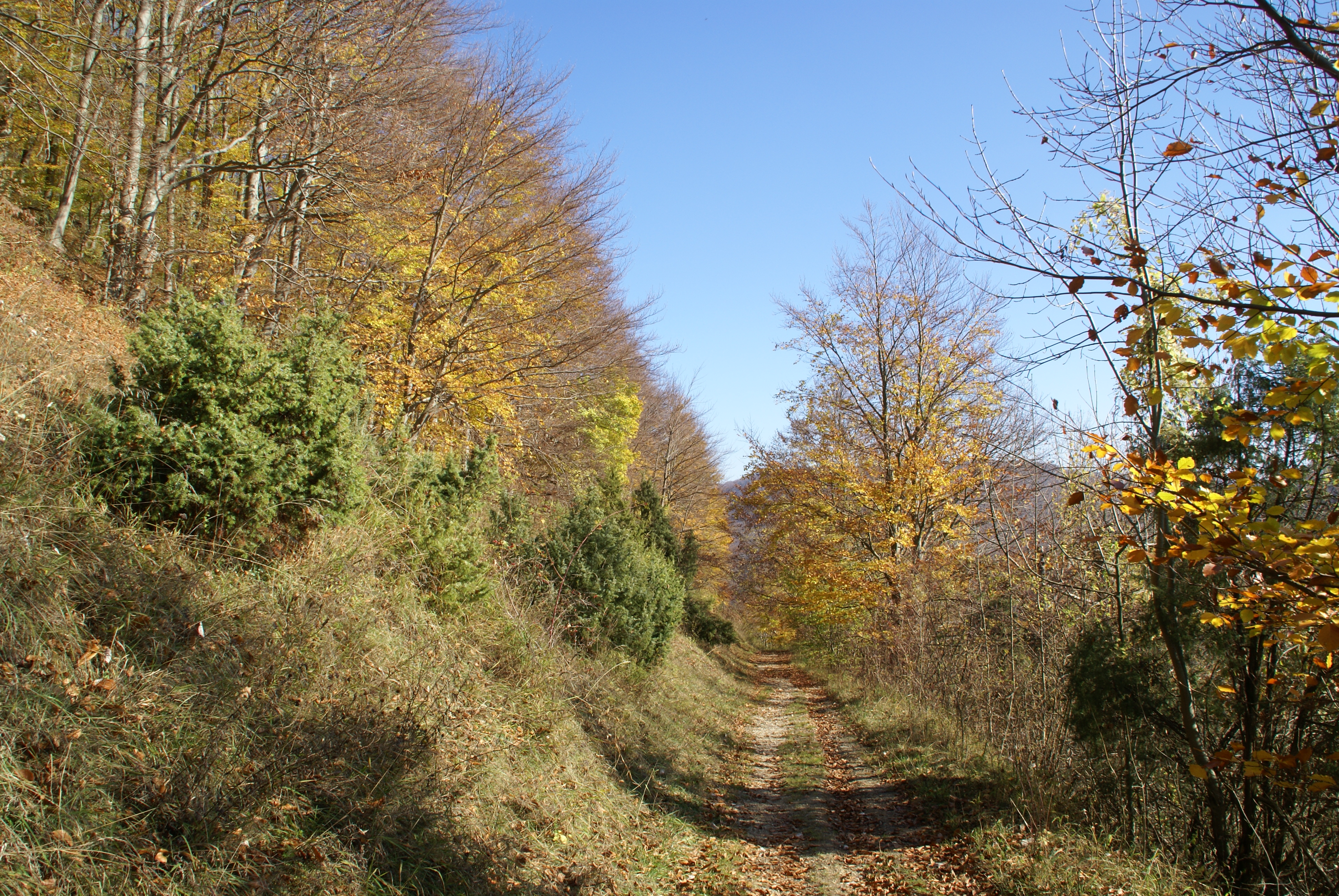 Herbstliche Wacholderheide auf der Schwäbischen Ostalb bei Heubach